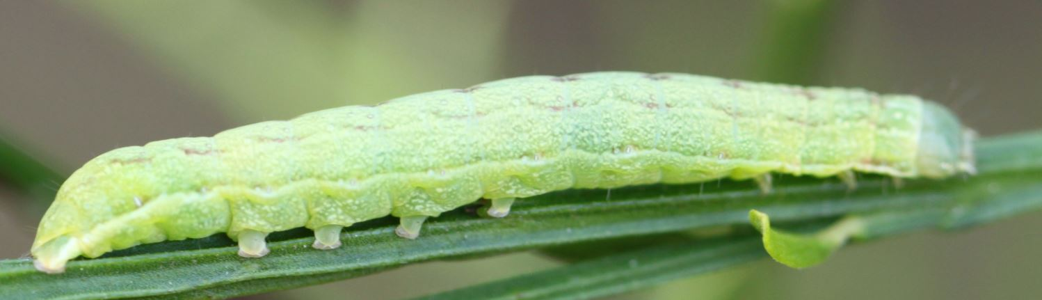 Raupe der Pfeilflecken-Kräutereule (Lacanobia contigua) am 12.9.2016 in der Schwetzinger Hardt